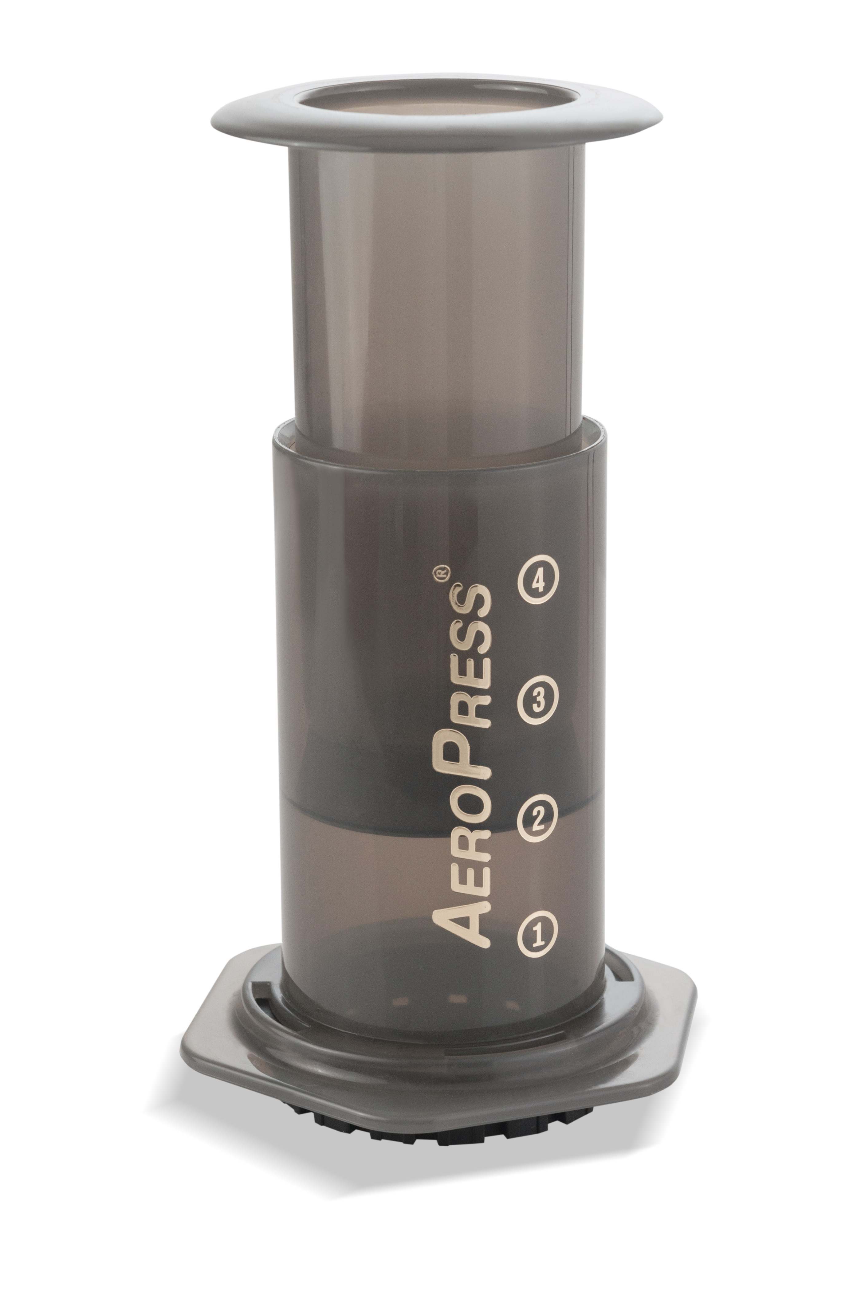 Aerobie Aeropress